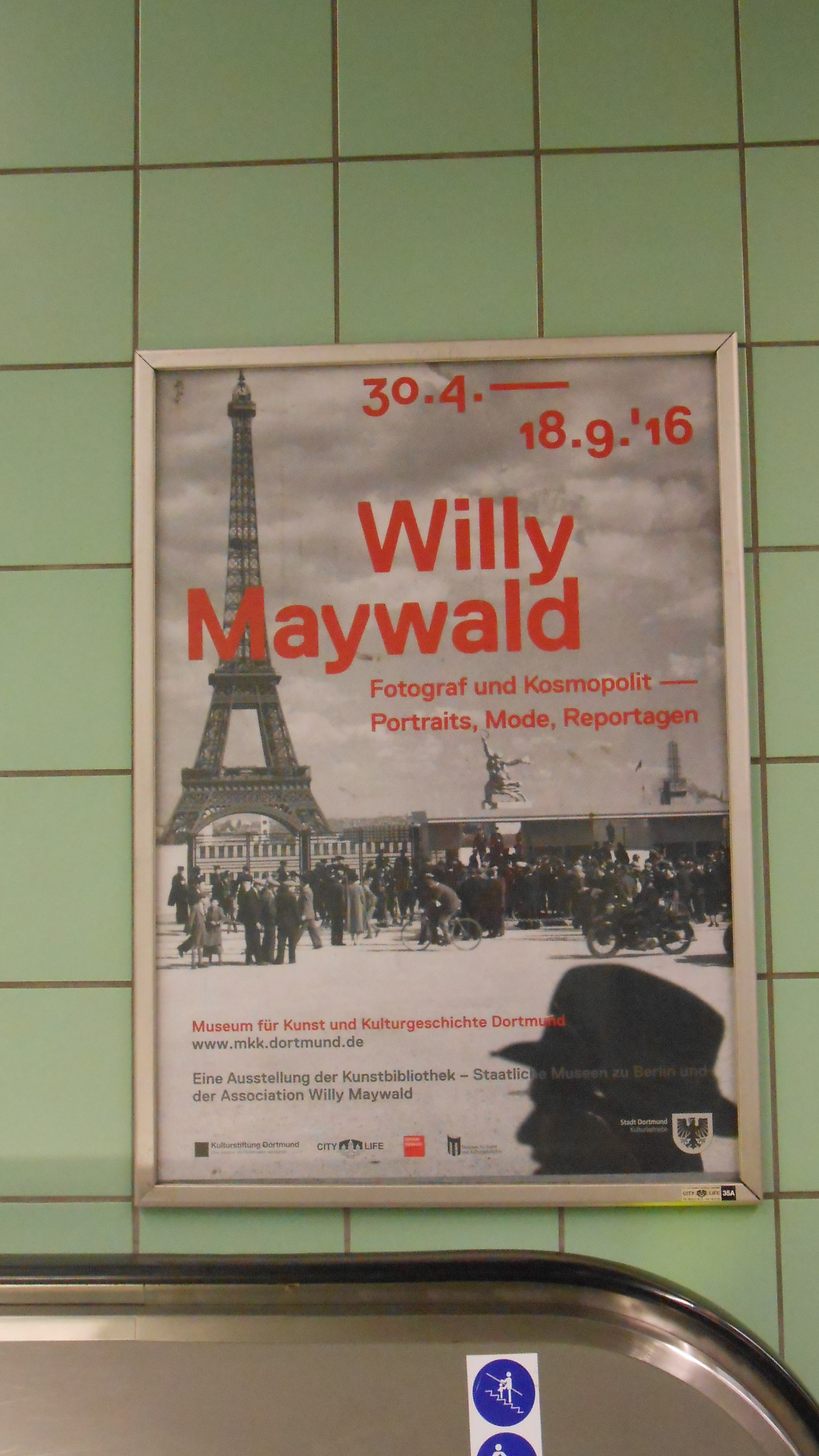 Plakat zur Willy Maywald-Ausstellung 2016 im Dortmunder Museum für Kunst- und Kulturgeschichte, gesehen in der U-Bahn Haltestelle Städtische Kliniken am 7. Mai 2016.